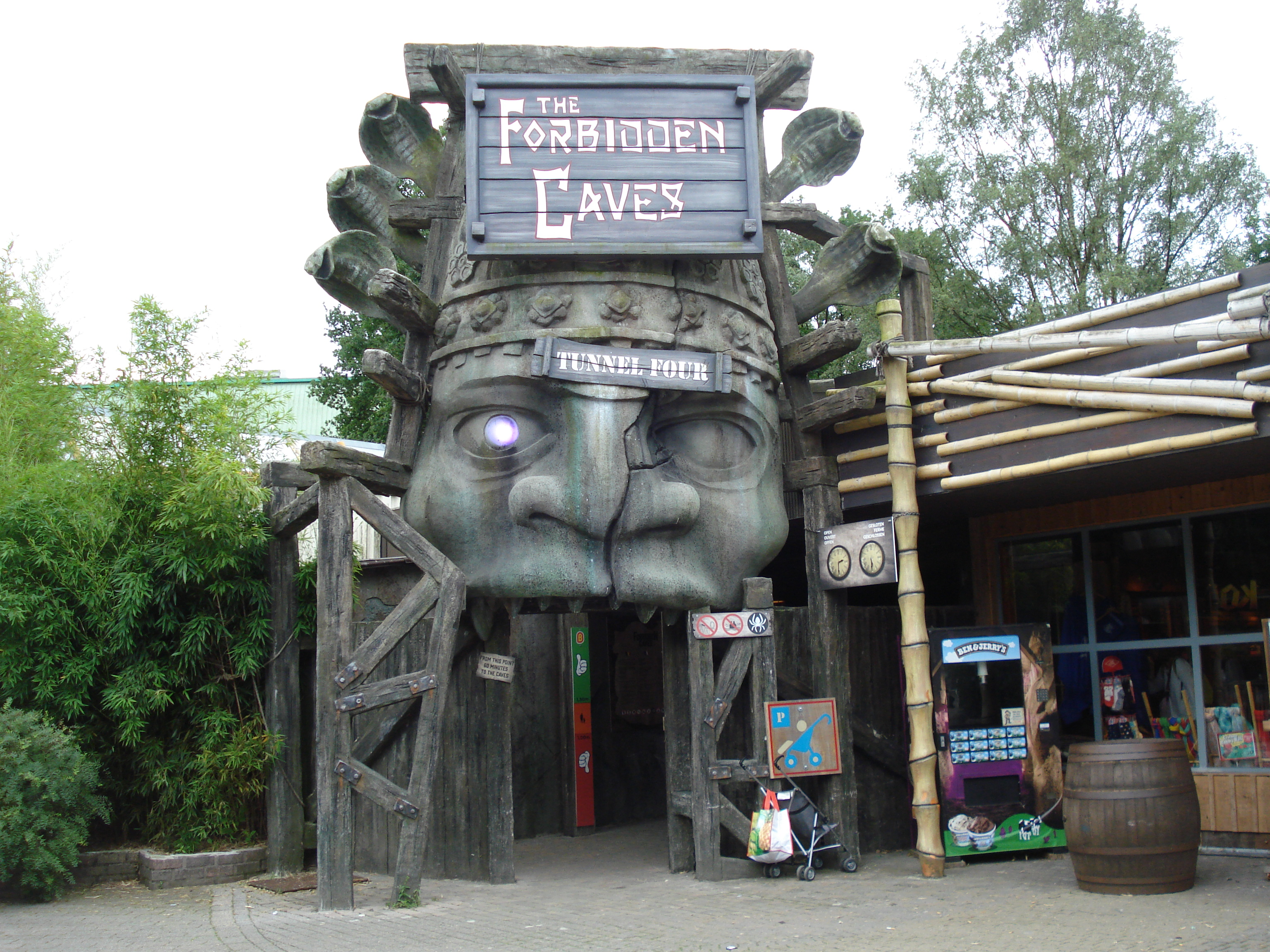 The Forbidden Caves, ingang